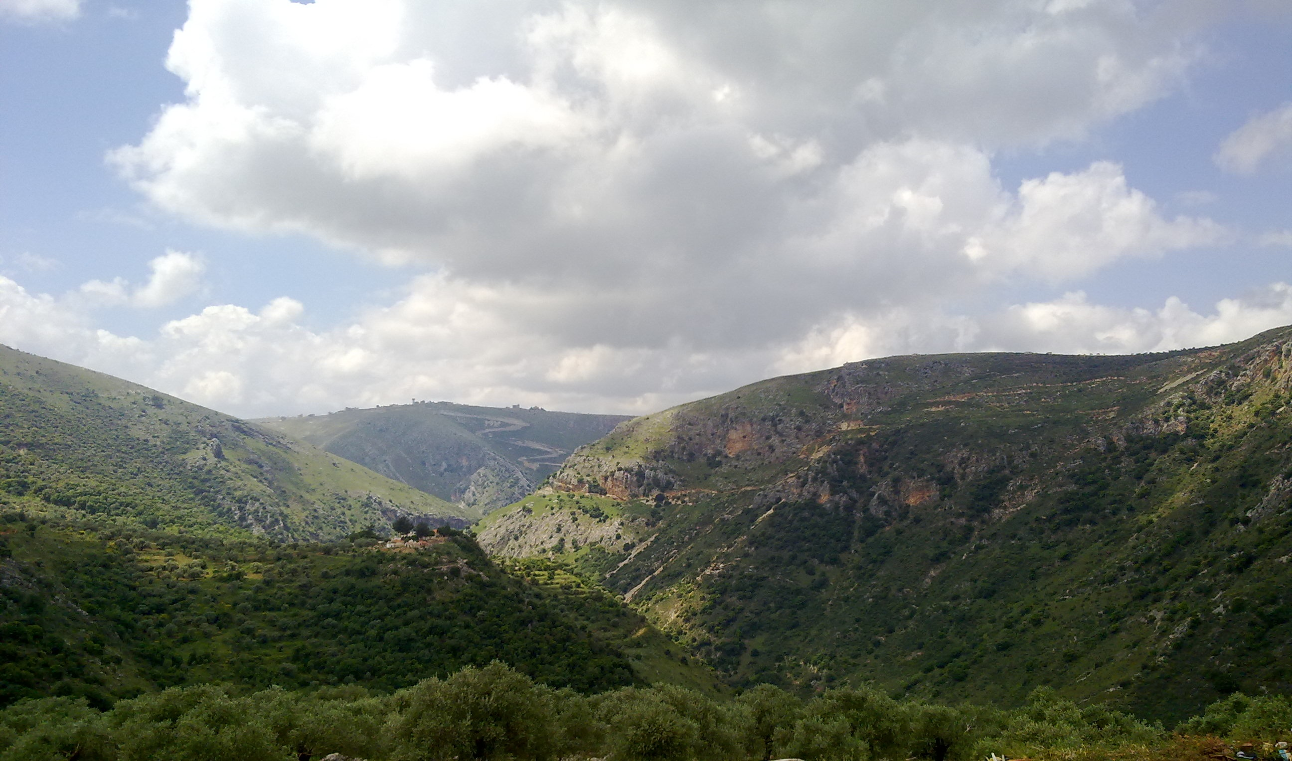 Qlayaa, Lebanon